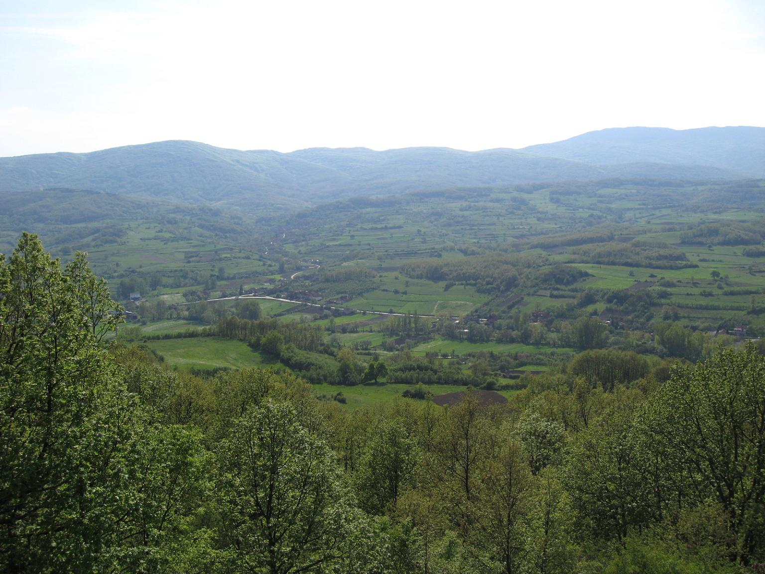 Obronci Suve Planine, pogled sa brda Šanac. Dragan Cvetković, sopstvena slika.